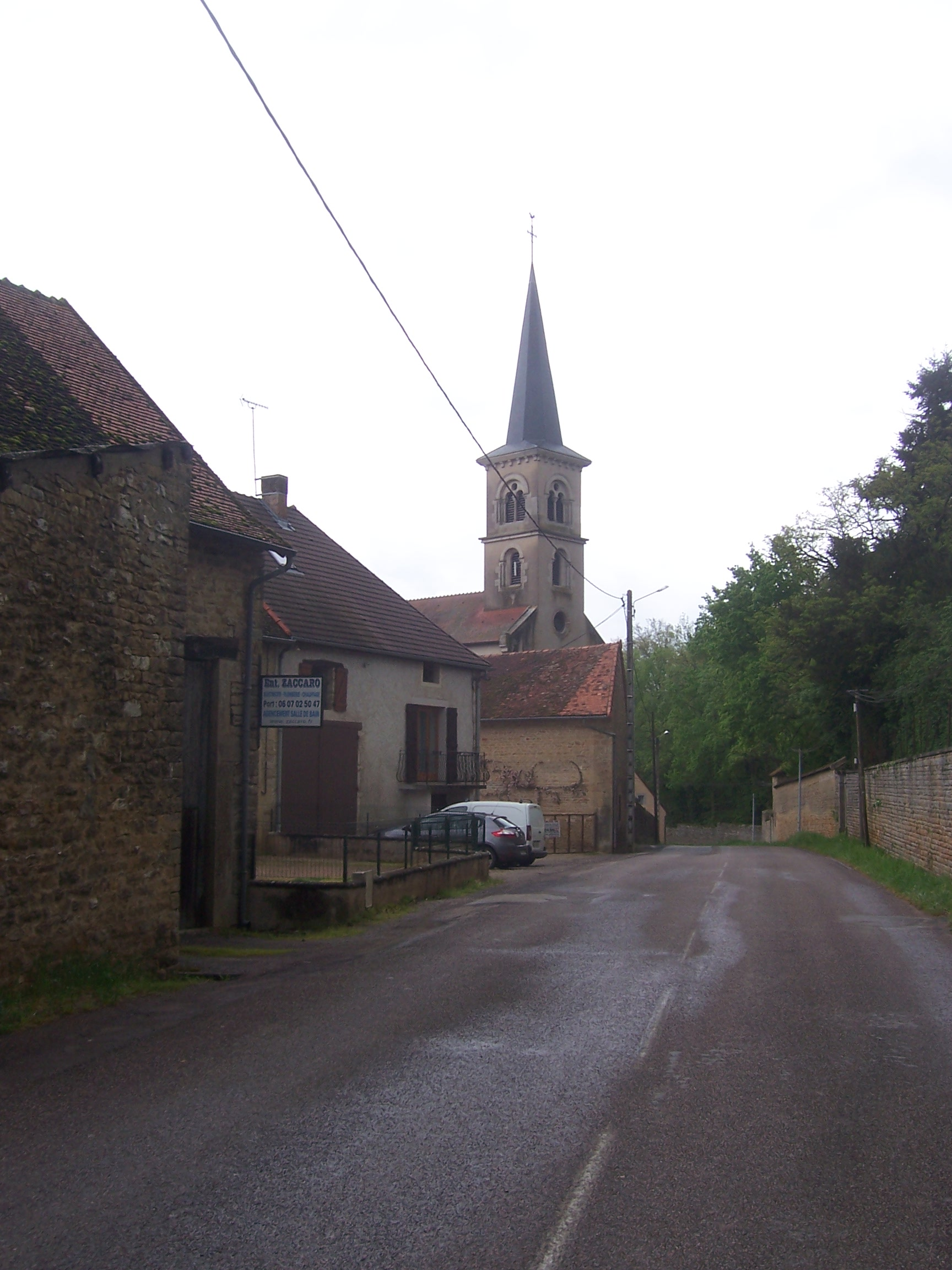 Saint-German-lès-Buxy